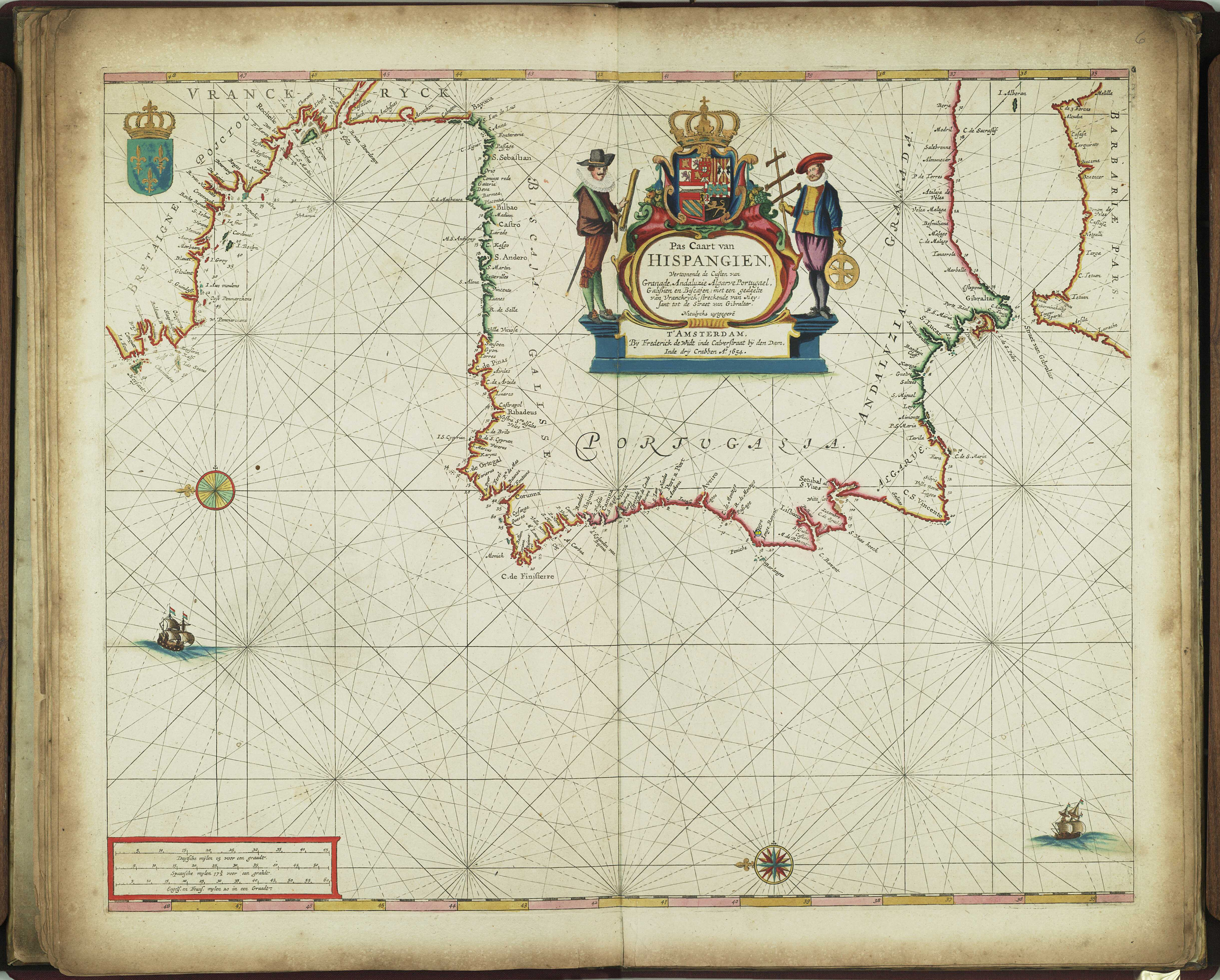 Eén van de oudst bekende kaarten van F de Wit, met plaatsaanduiding: "Inde dry Crabben"